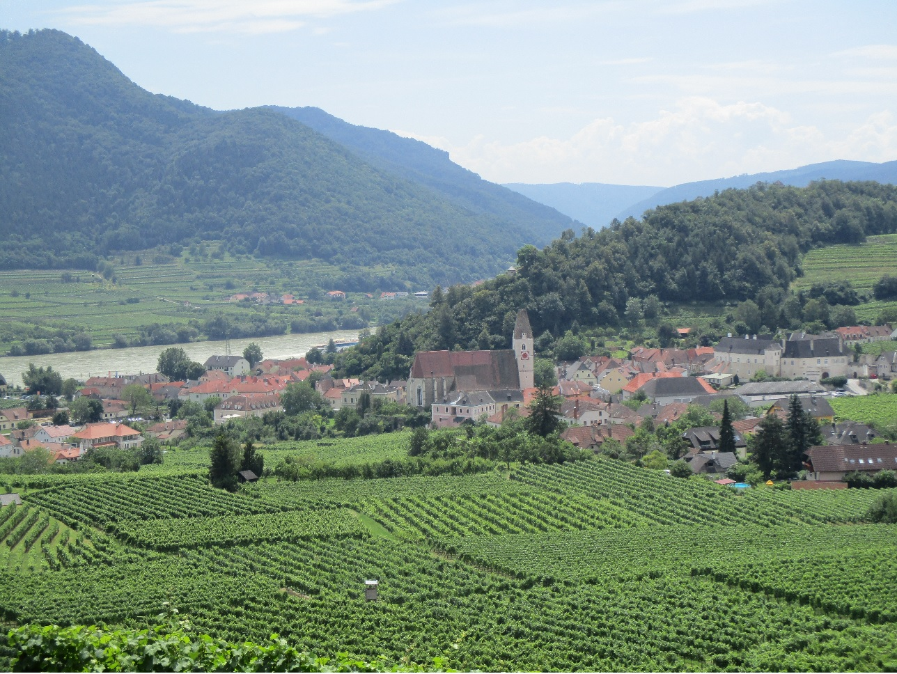 Vue générale de Spitz dans les vignes et au bord du Danube. Au centre, l'église Saint-Maurice; sur la droite, le château.